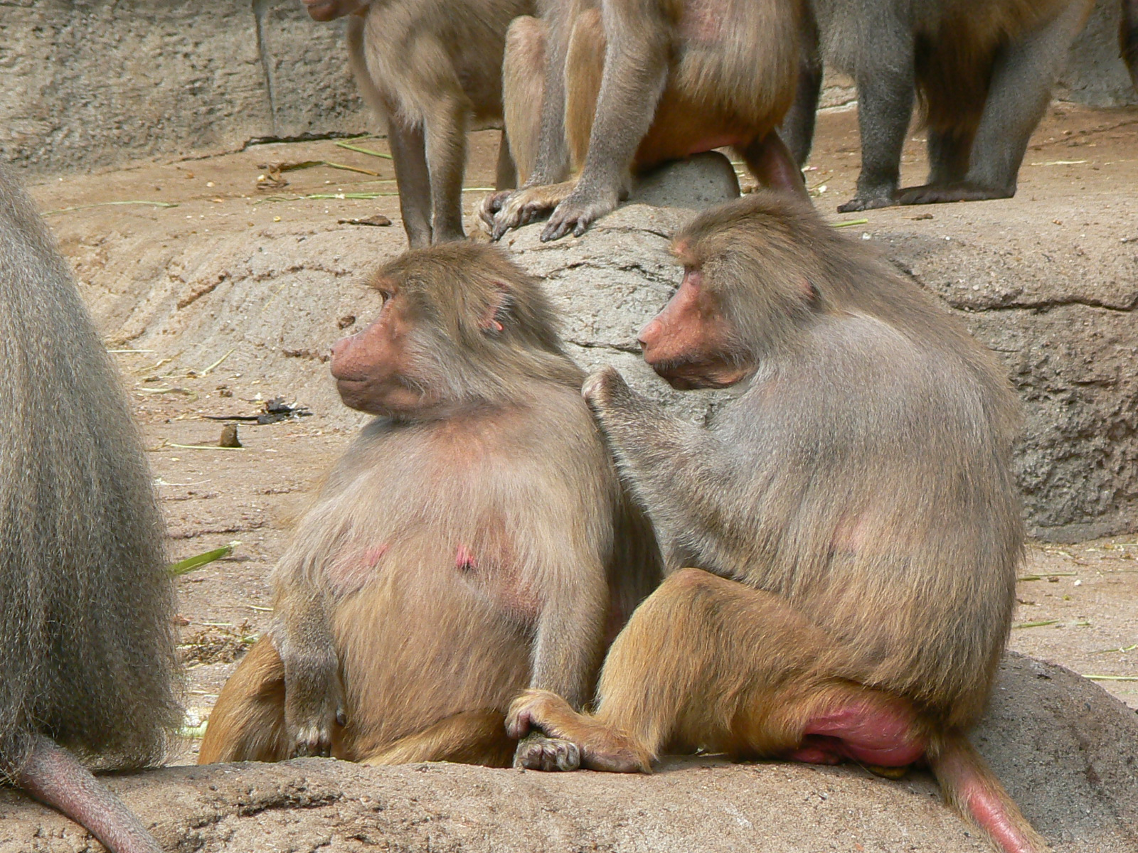 Papio hamadryas / hamadryas baboon / mantelpavian